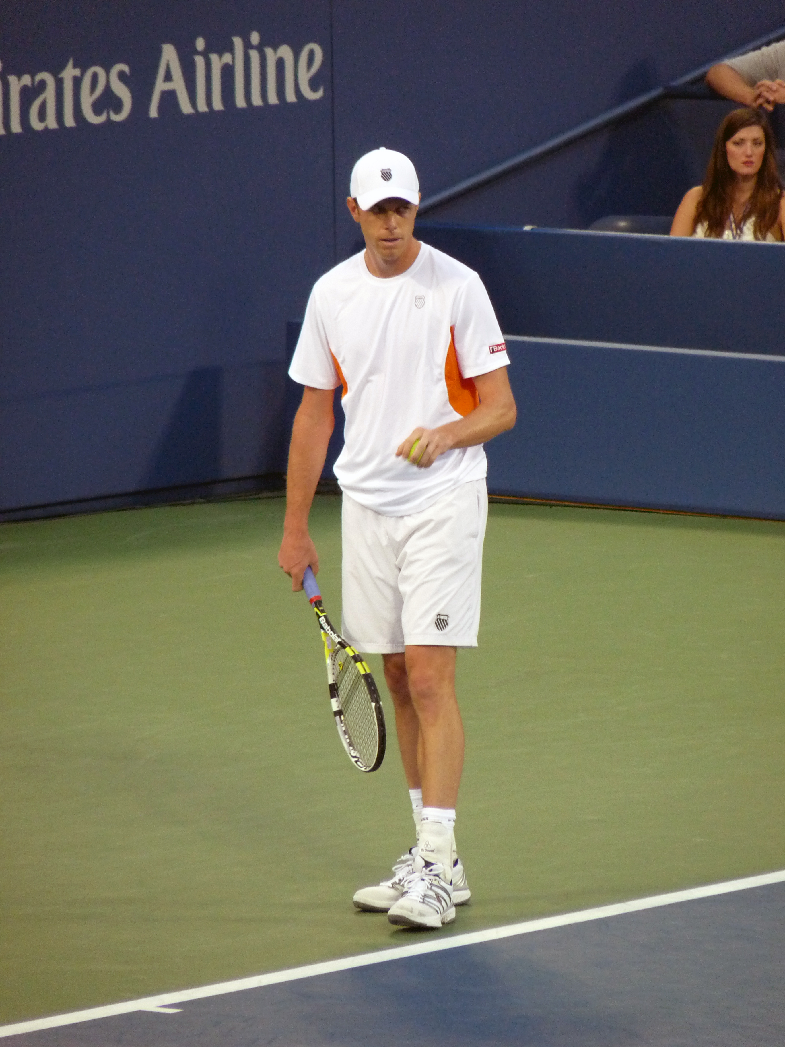 US Open 2012 Men's Singles 3rd Round (Louis Armstrong Stadium# Tomáš Berdych [6] vs. Sam Querrey [27] 6–7#6–8#, 6–4, 6–3, 6–2